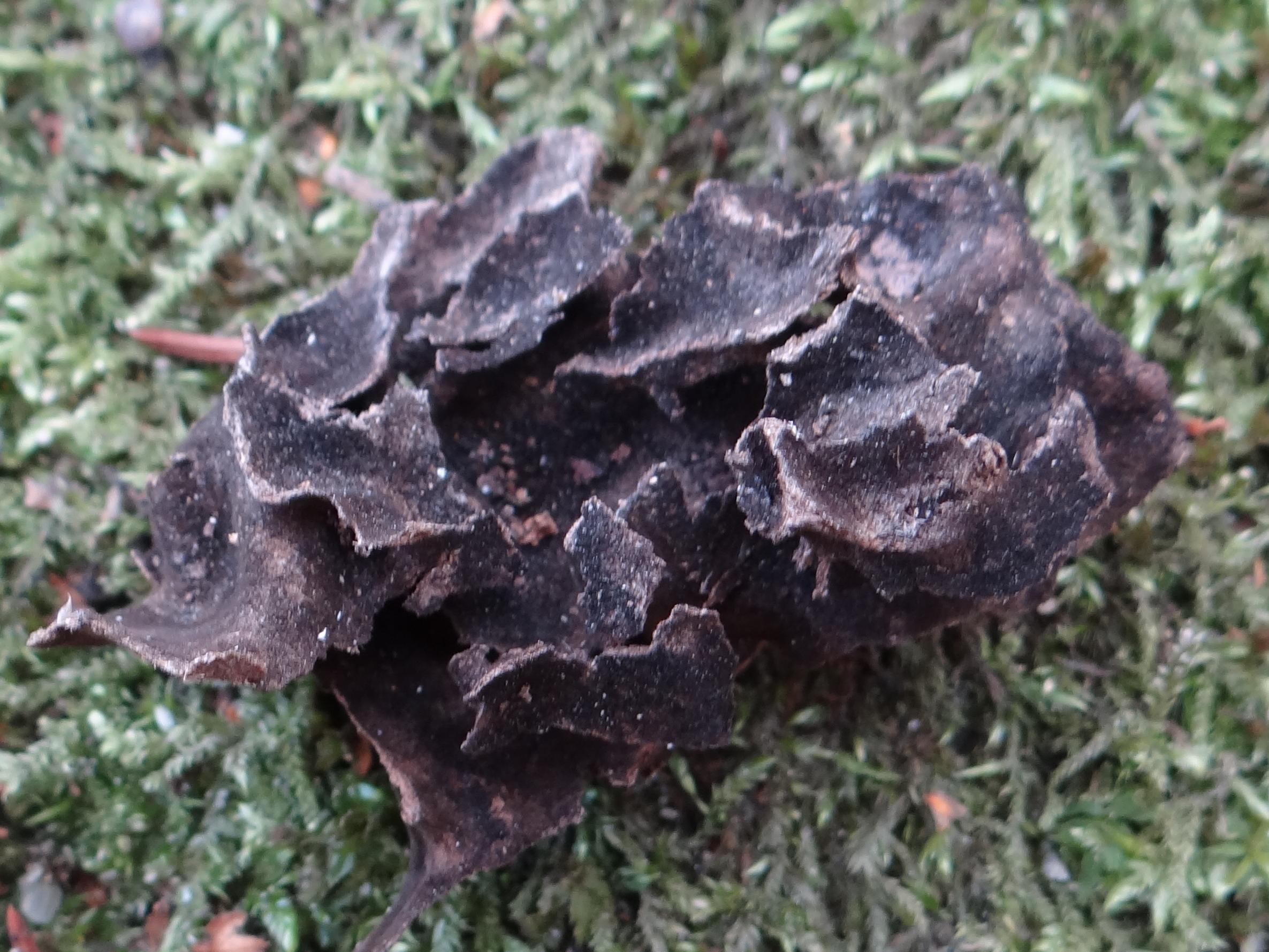 Leptogium saturninum (location: Poland, Ciężkowice, Skamieniałe Miasto)